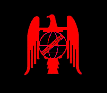 Logotipo del Servicio Exterior de Falange.